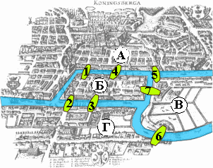 Карта семи мостов Кёнигсберга Старинная карта Кёнигсберга с обозначенными на ней семью мостами